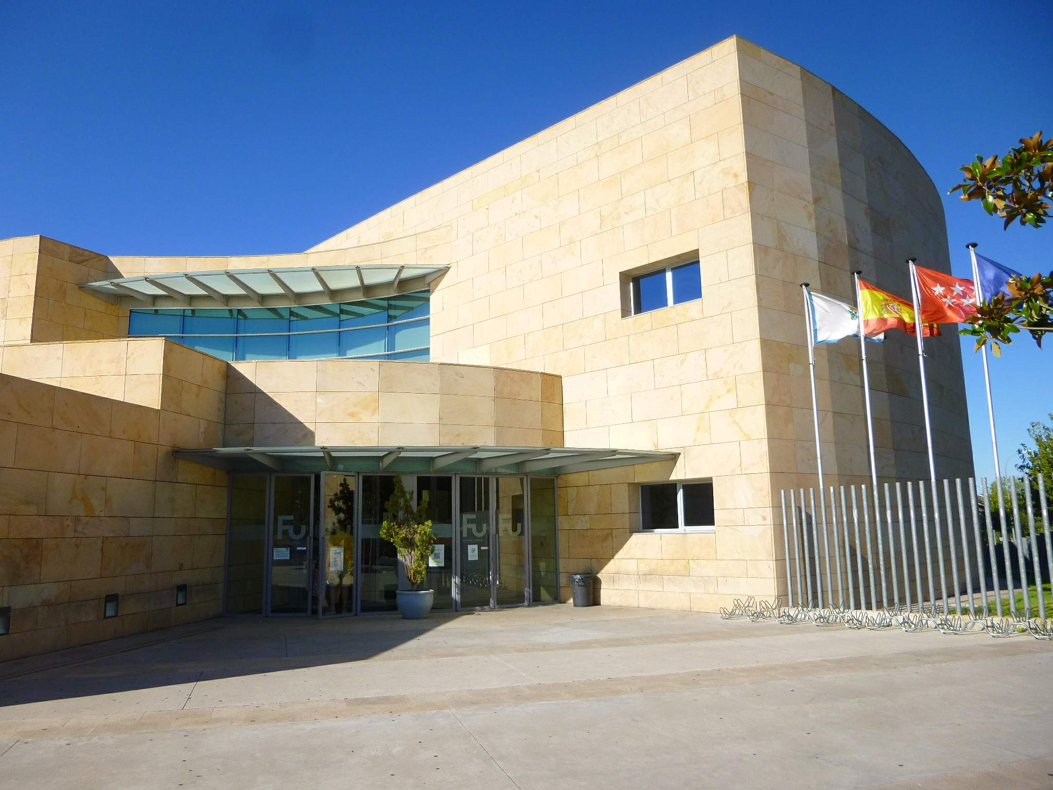 Biblioteca Municipal Francisco Umbral (Majadahonda, Madrid)